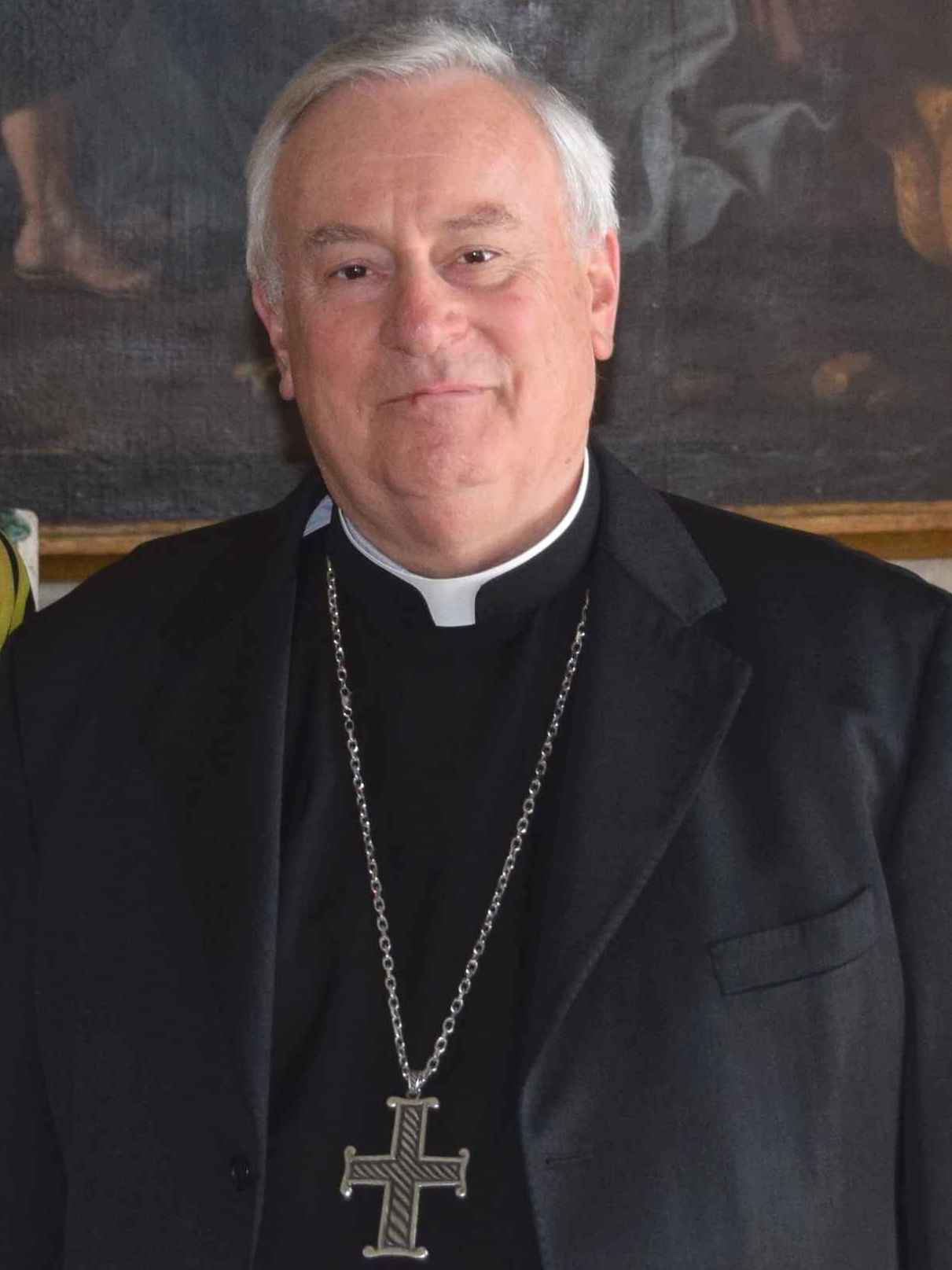 Donatella Porzi e Gualtiero Bassetti